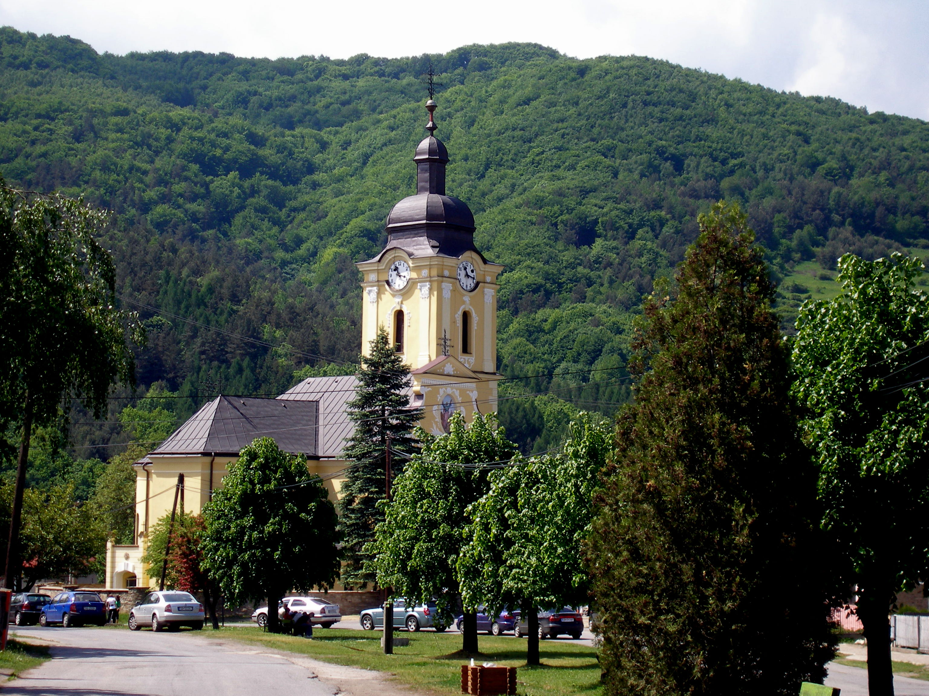 Obec Pečovská Nová Ves okres Sabinov